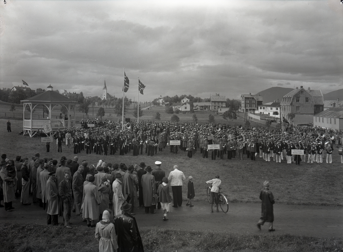 7. Nord-Norske Musikkstevne på Sortland